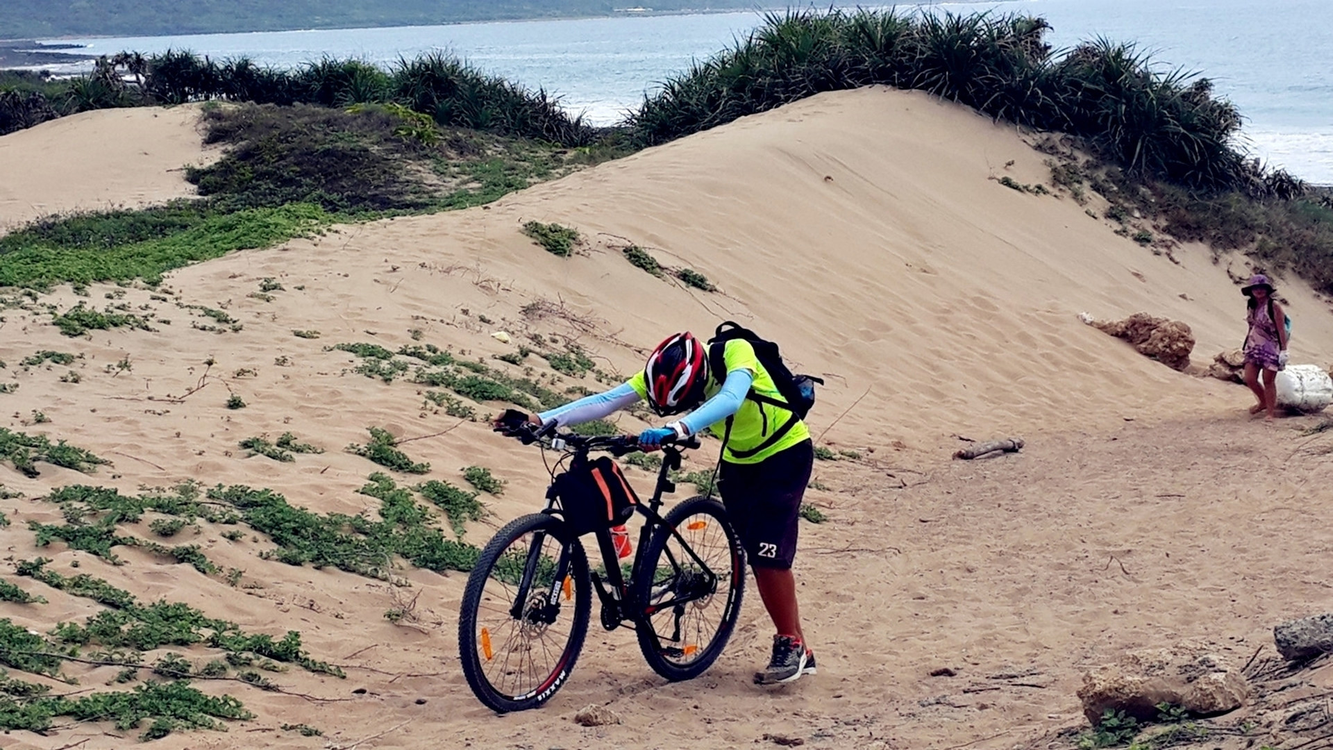 風吹砂為鵝鑾鼻與佳樂水兩遊憩區之中間站，其臨近地區皆屬珊瑚礁岩，唯獨此處因地層為紅土及沙的混合物，冬天東北季風吹拂時，將沙沿崖坡吹送至崖頂，如此兩種逆向搬運作用，而造成風吹砂之特殊地形景觀。